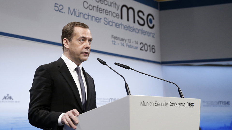 Выступление Дмитрия Медведева на панельной дискуссии на Мюнхенской конференции по вопросам политики безопасности